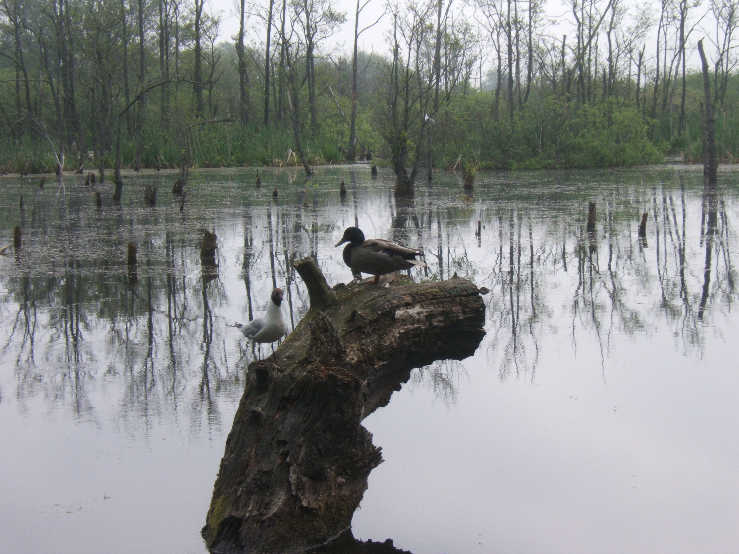 Podczele/Kołobrzeg/Poland EkoPark Wschodni